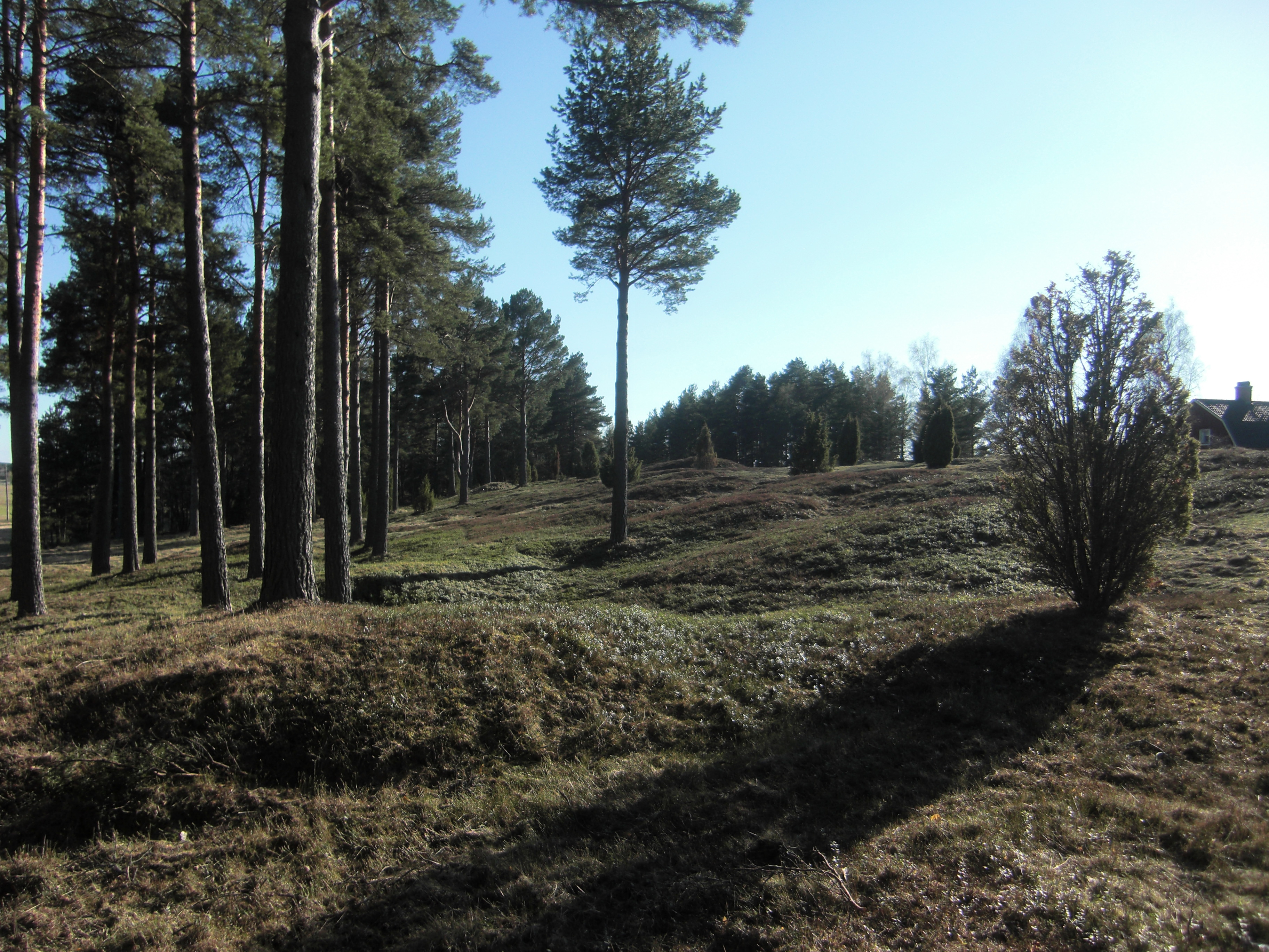 Gravhögar på Sörby gravfält (Raä-nr Årsunda 9:1) i Årsunda socken, Sandvikens kommun, Gästrikland, Gävleborgs län, Sverige.